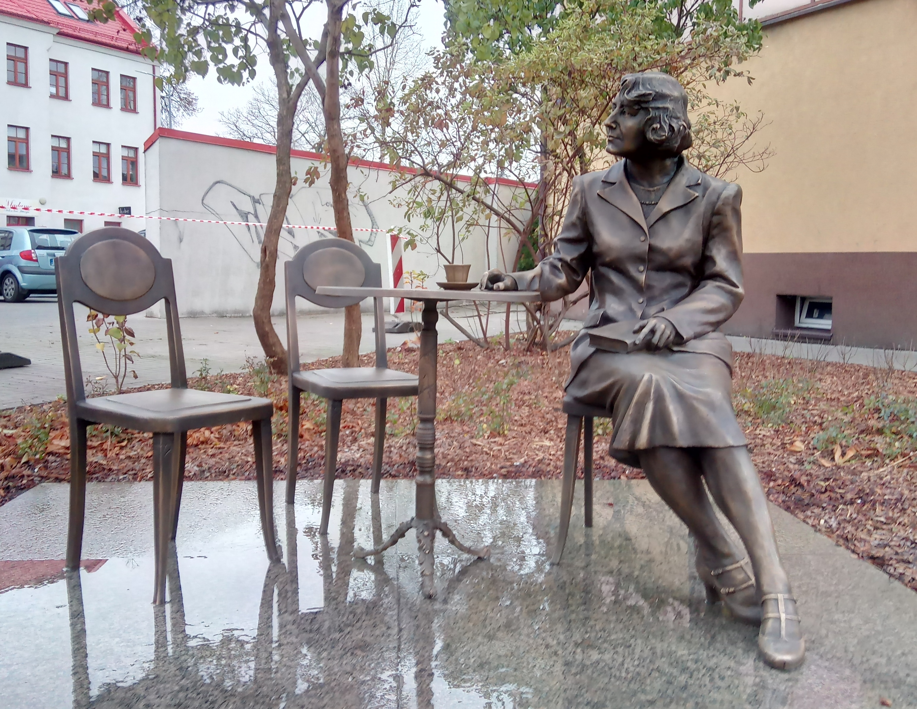 Pomnik Zofii Nałkowskiej w Wołominie, rok powstania 2019 r. autor: Wojciech Mendzelewski